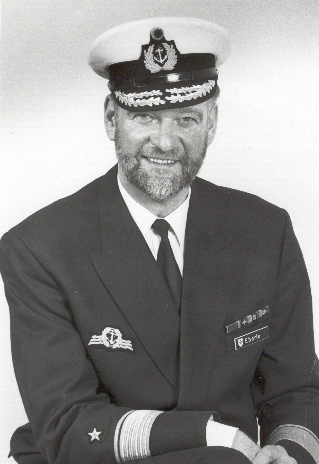 Porträtfotografie von Flottillenadmiral Götz Eberle